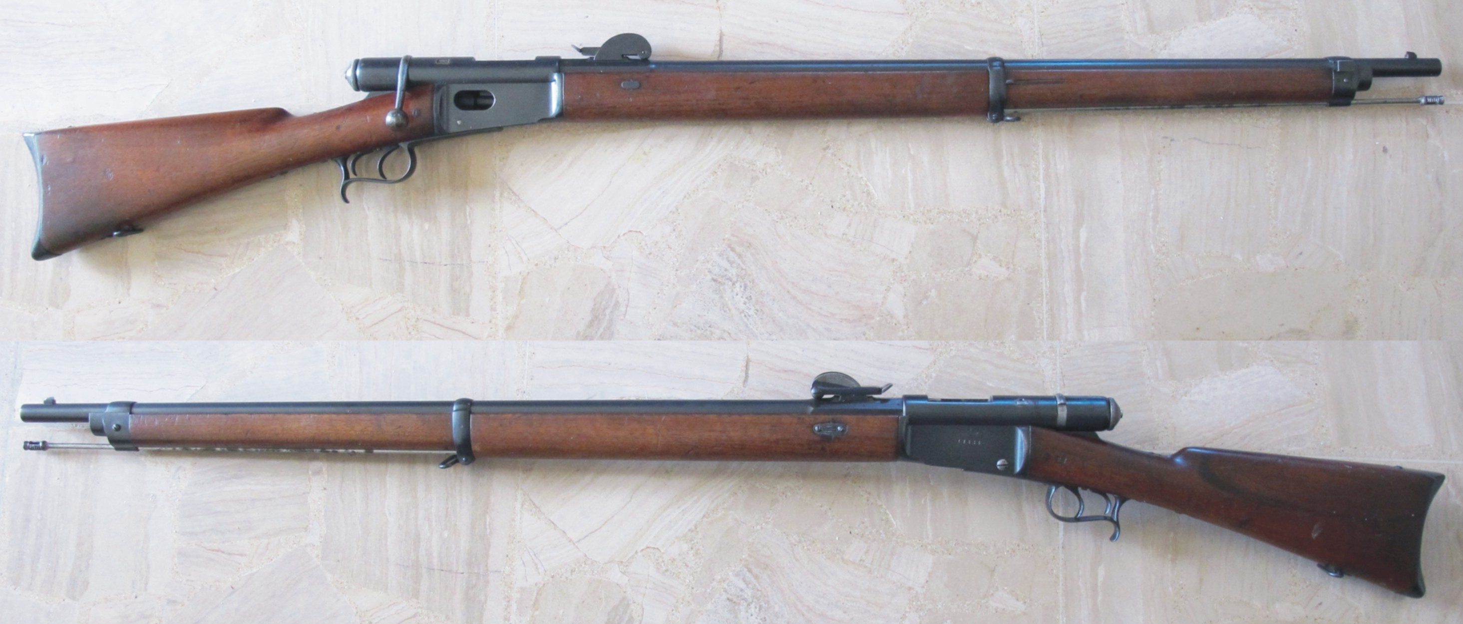 Carabine Vetterli, modèle de 1881